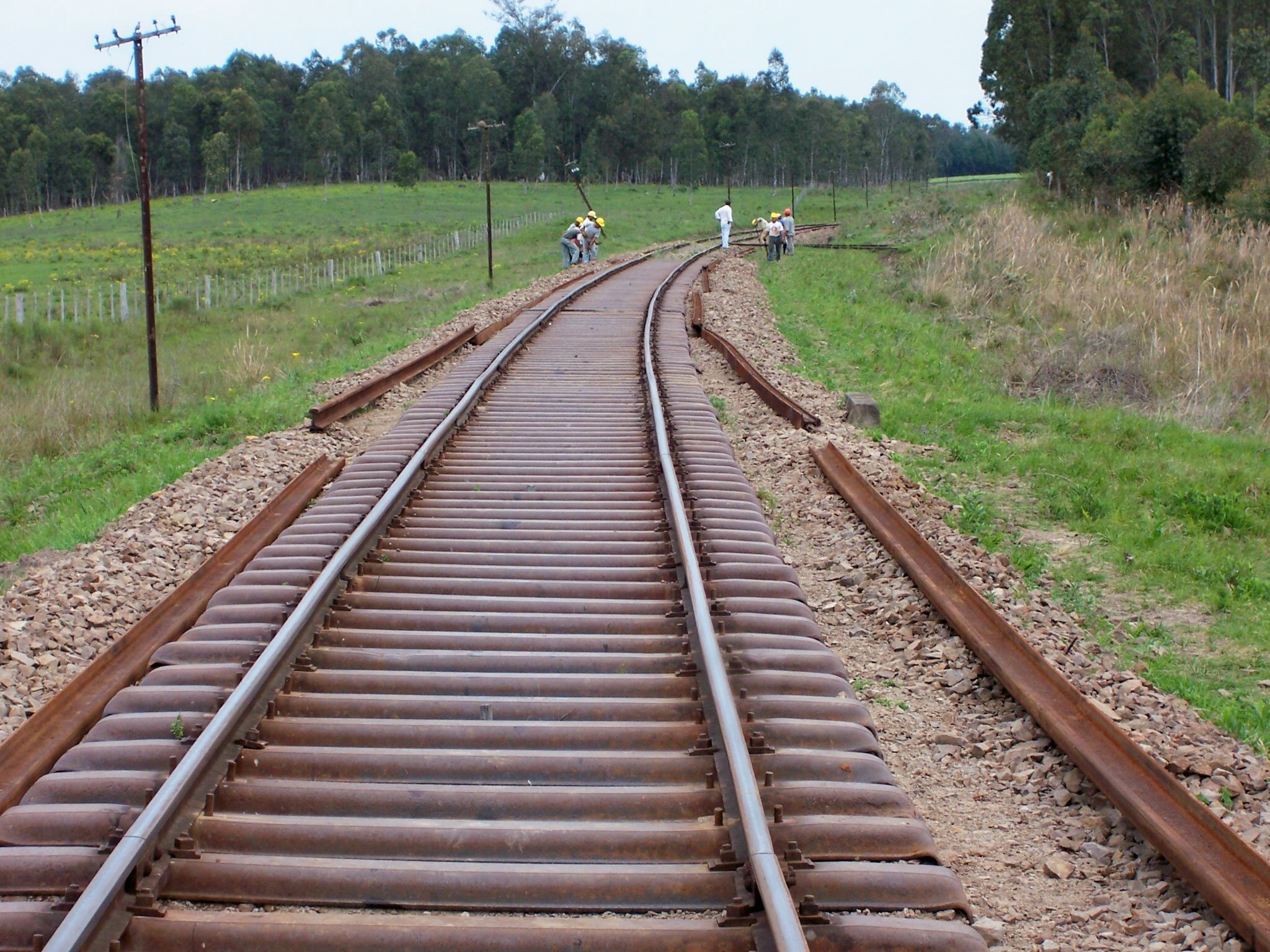 Vía sobre durmientes de acero, Tacuarembó, Uruguay. Foto tomada durante las labores de mantenimiento en la Línea a Rivera, inmediatamente al sur del pasaje a desnivel entre la vía y la Ruta 26, se observa la estructura de la vía sin el balasto, que ha sido retirado en su mayor parte. Los rieles colocados son los rieles a sustituir, en la banquina se observan los rieles nuevos a colocar.